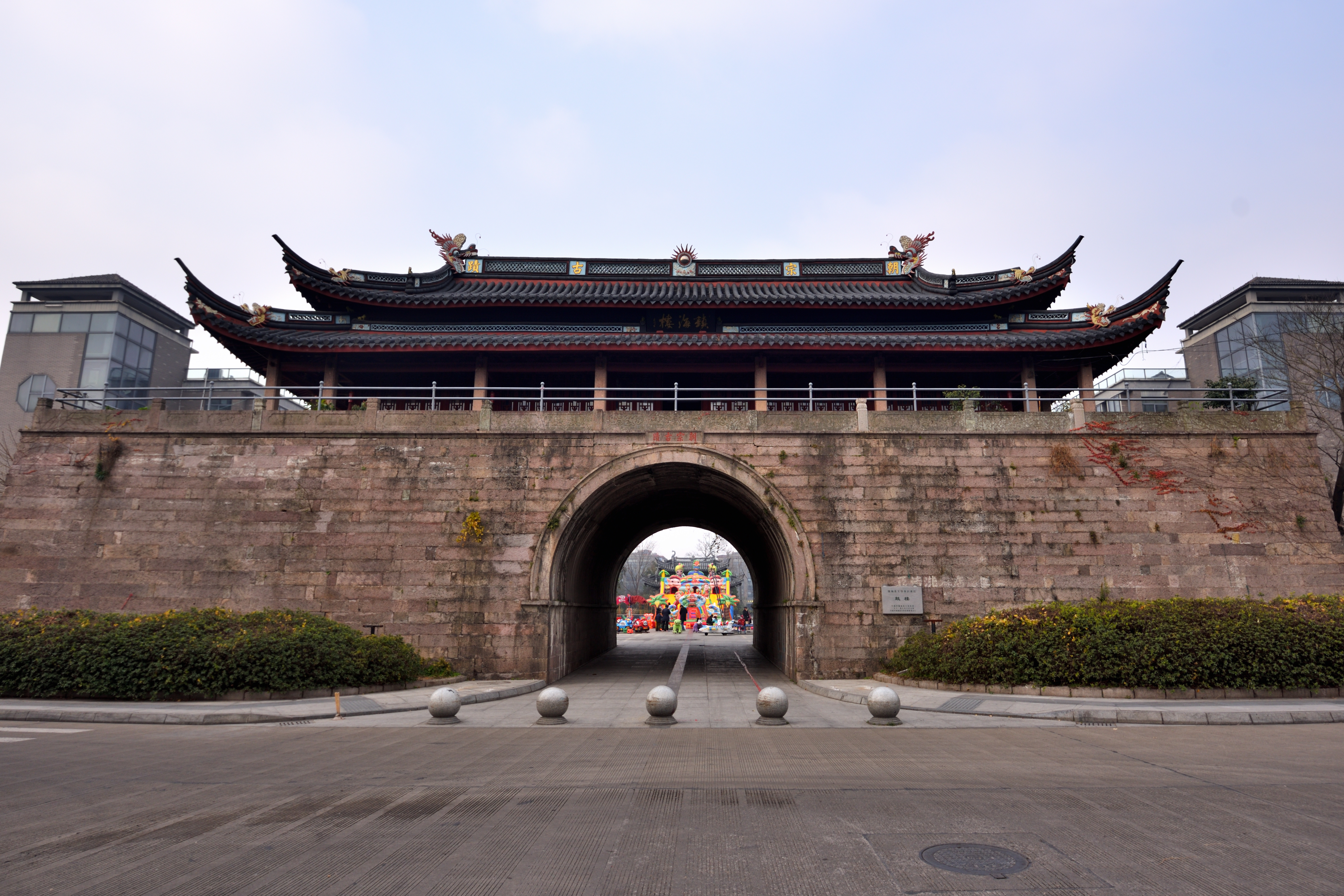 镇海鼓楼，2017-01-27